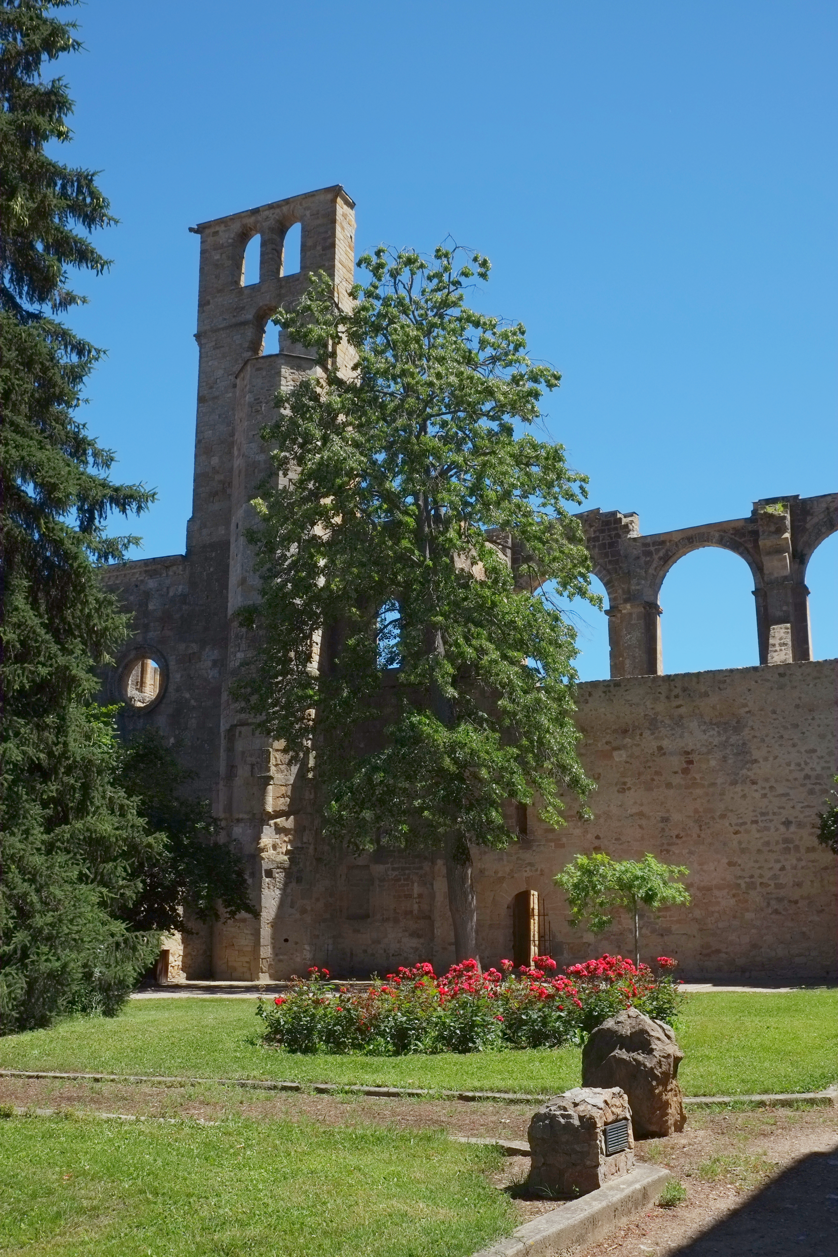 Ehemalige Abtei in Alet-les-Bains (Frankreich)